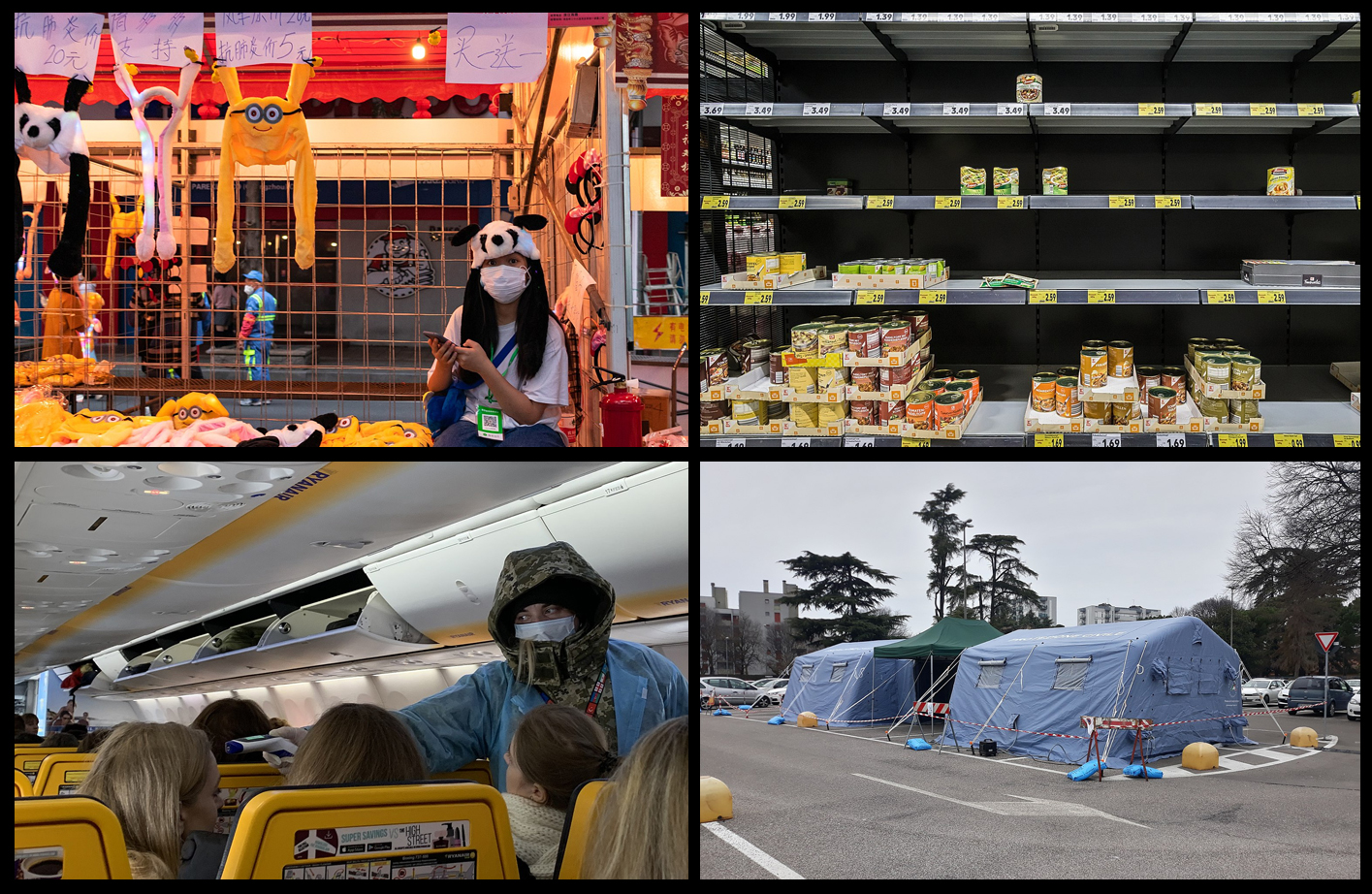 El coronavirus a nivel mundial.